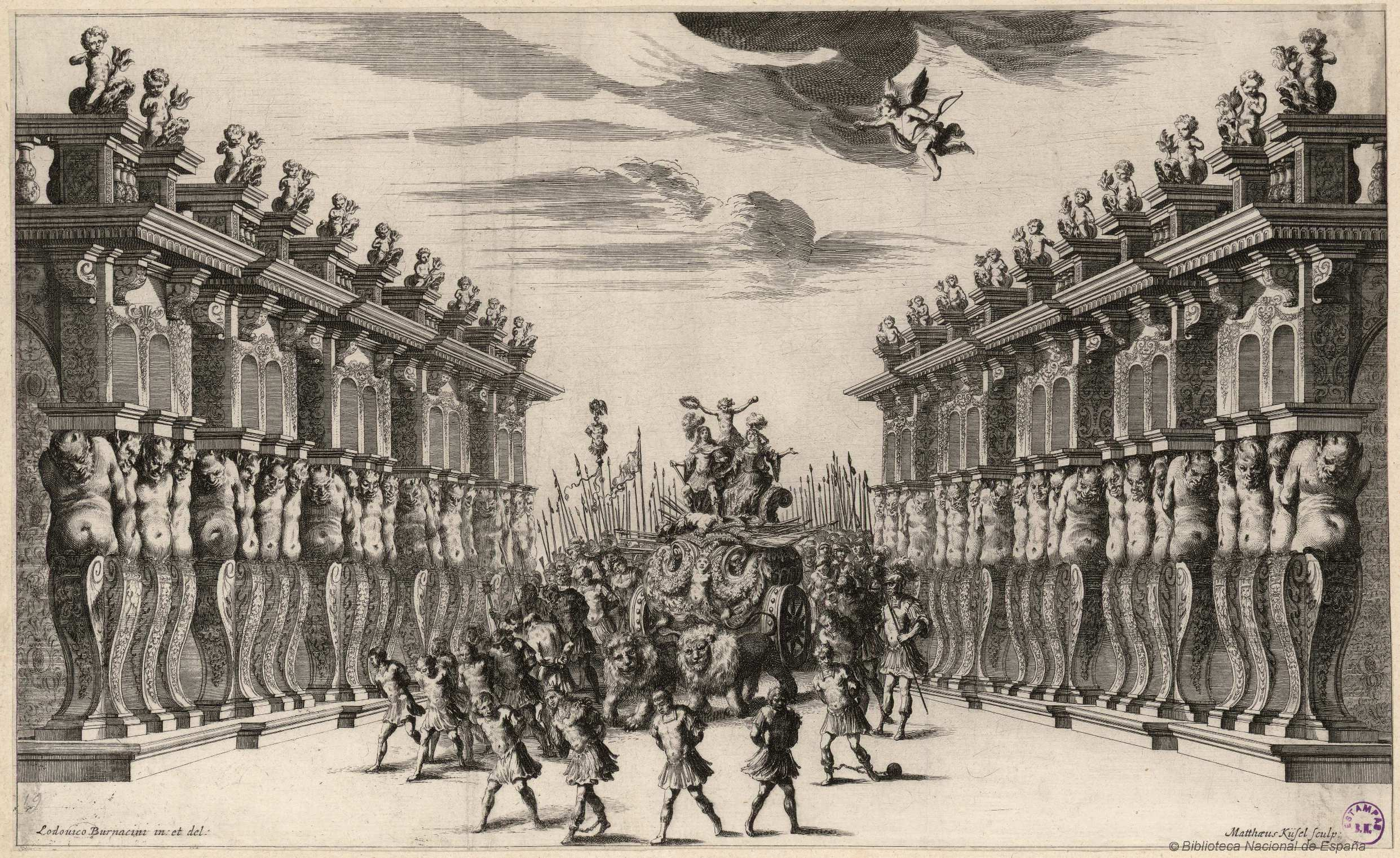 Triunfo de Venus y Marte. Aguafuerte y buril de Mathäus Küsel por diseño de Ludovico Ottavio Burnacini para la obra de Francisco Sbarra, "Il pomo d'oro. Festa teatrale rappresentata in Vienna per l'augustissime noze delle Sacre Cesaree e Reali Maestà di Leopoldo e Margherita", Viena, 1668. Ópera musicada por Antonio Cesti. Firma: "Lodouico Burnacini del. ; Matthaeus Küsel Sculp:". Biblioteca Nacional de España.